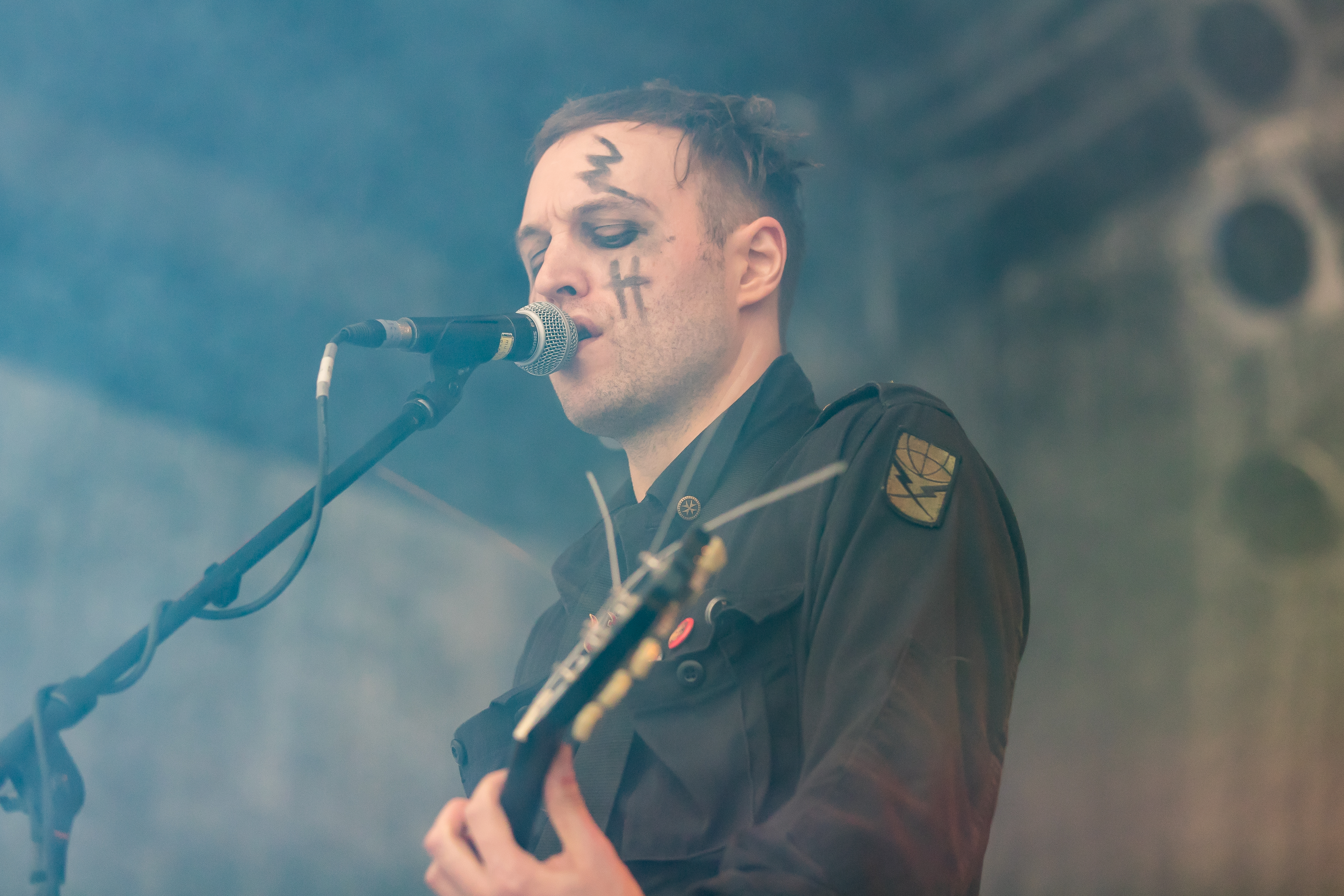 Nim Vind during Summer Breeze 2016 at , Dinkelsbühl, Bayern, Germany on 2016-08-20, Photo: Sven Mandel